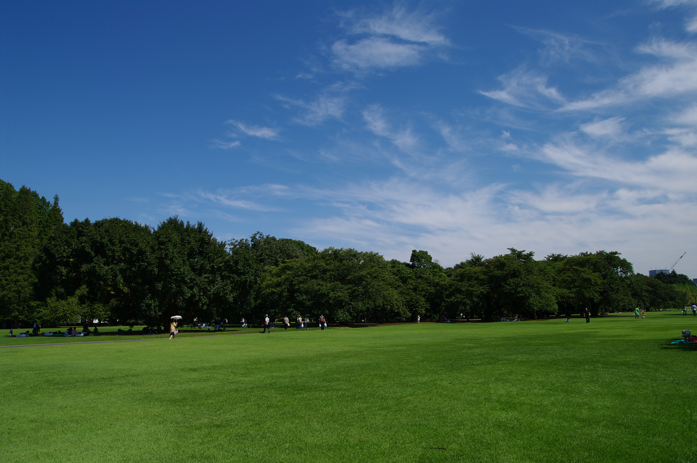 新宿御苑 K20D AF17-50mm(A16)